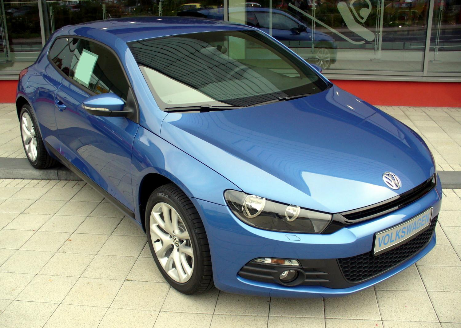 VW Scirocco III